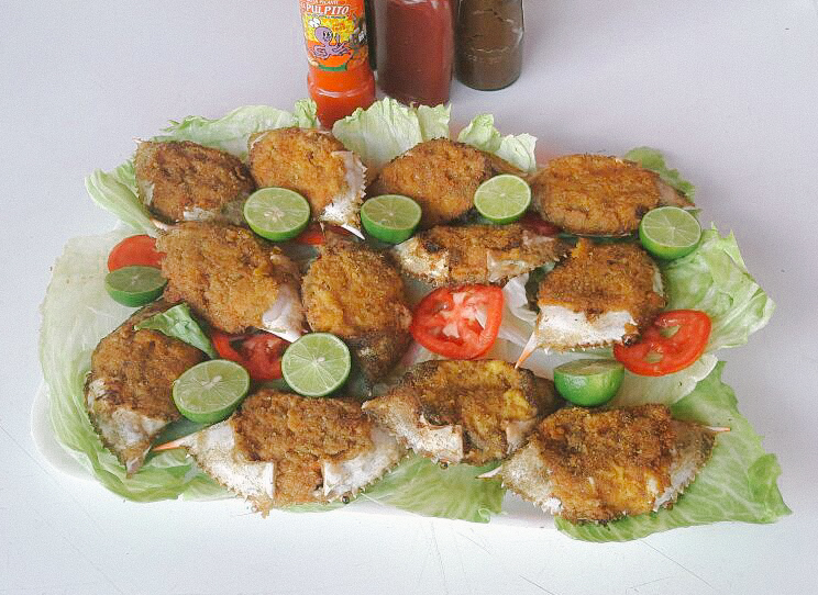 Jaibas Rellenas en Altamira, Tamaulipas